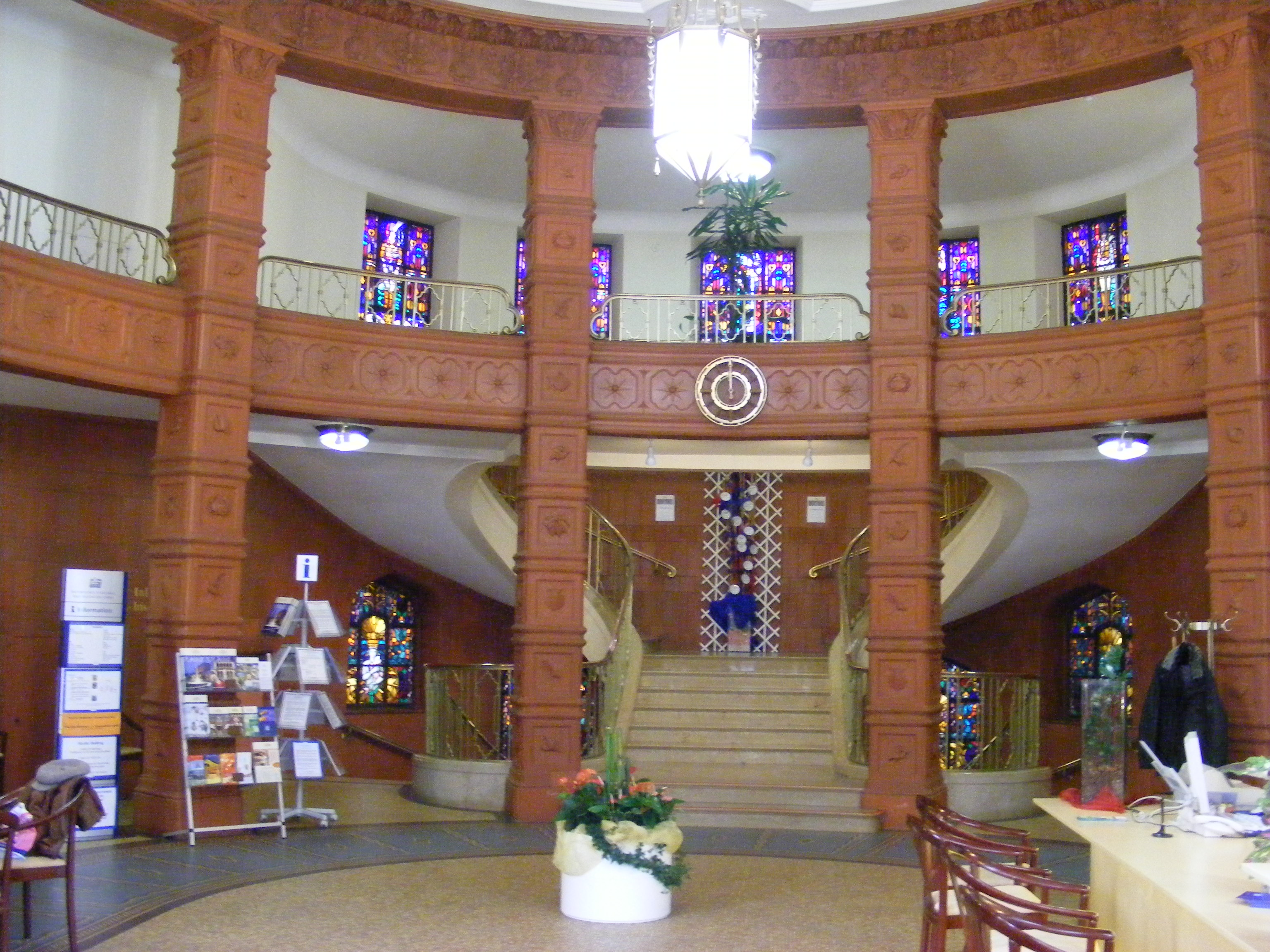 Kurbad Bad Kissingen - Empfangshalle.